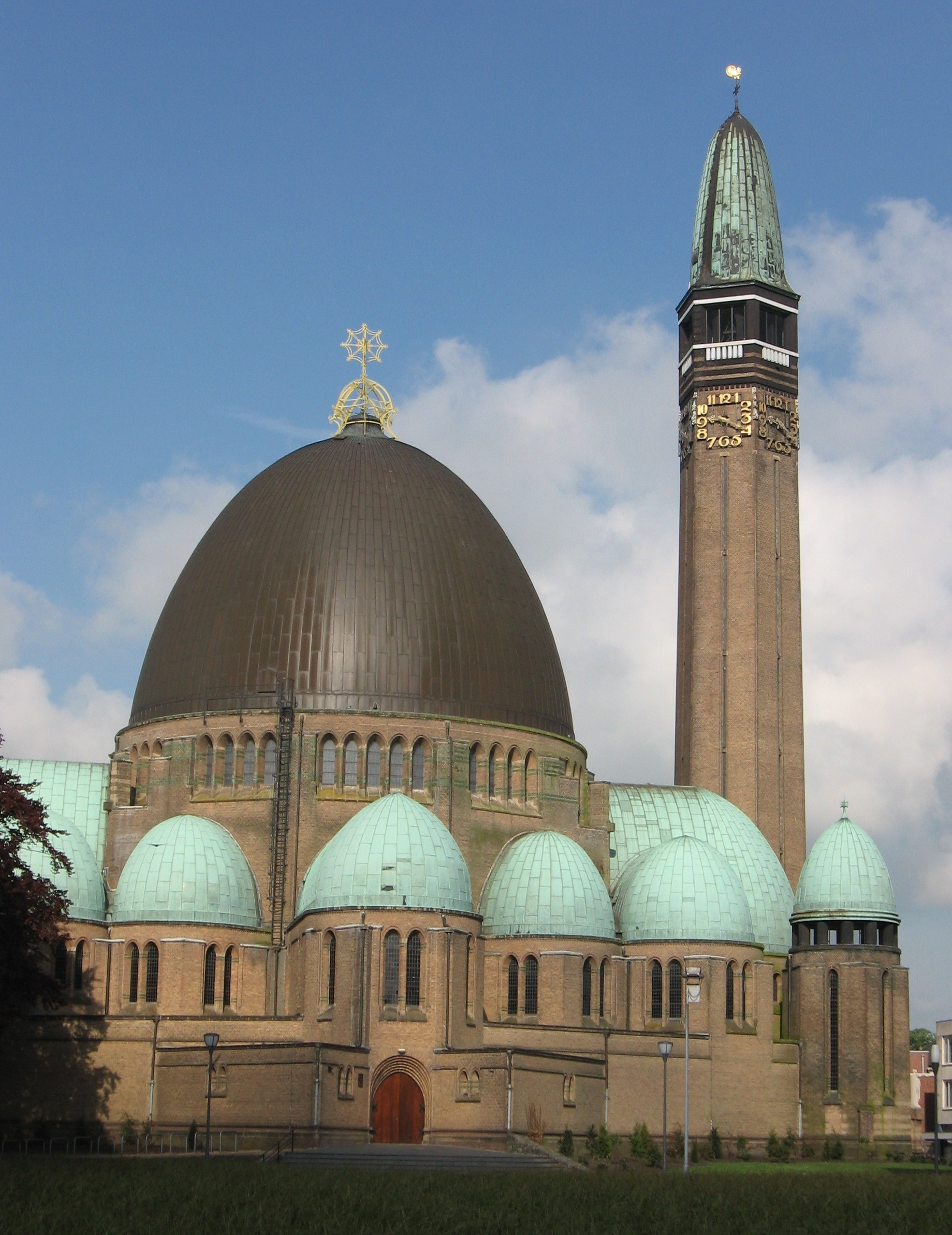 Waalwijk - Sint Jan.jpg, rijksmonument